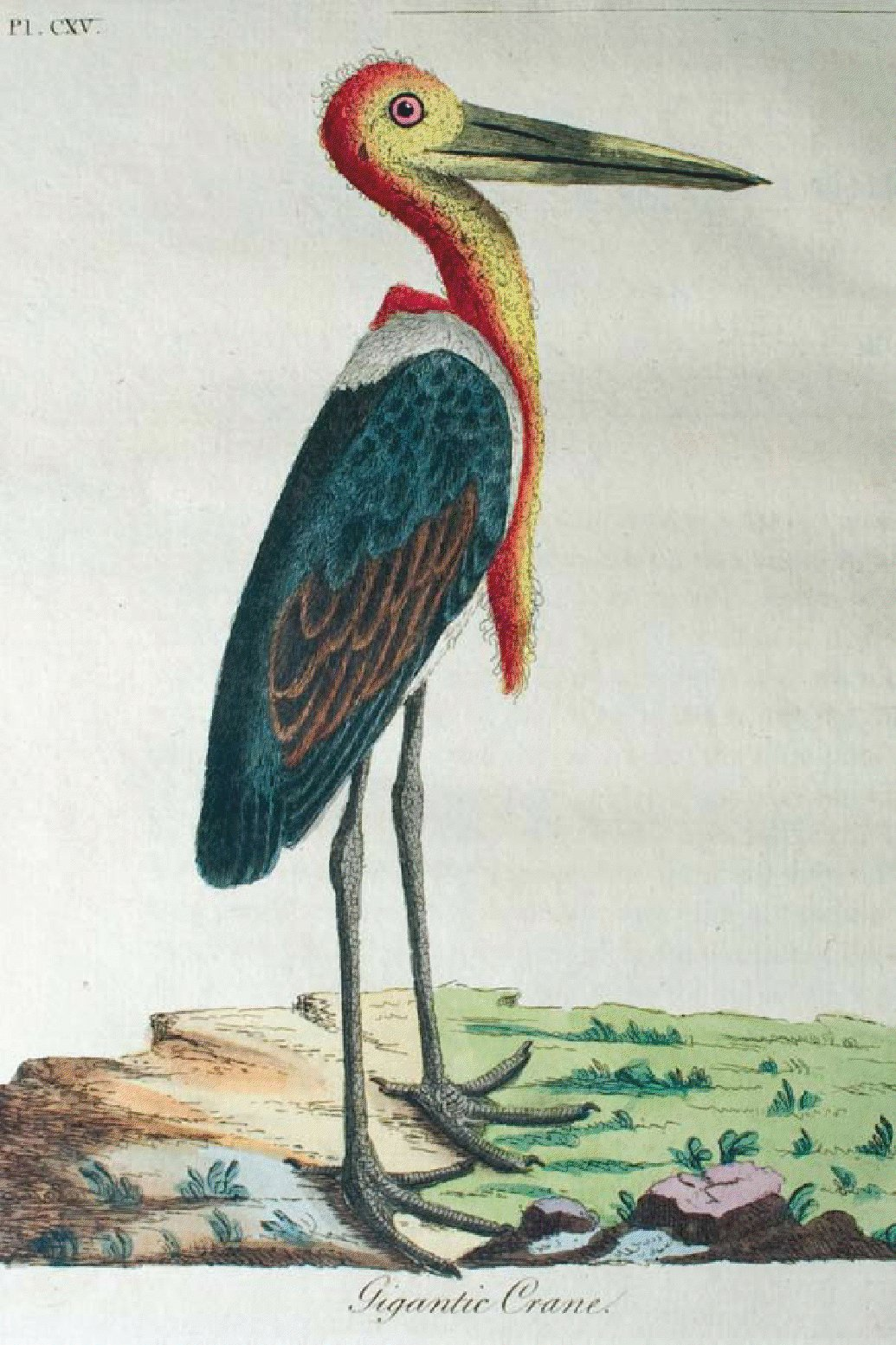 Leptoptilus dubius or Gigantic crane